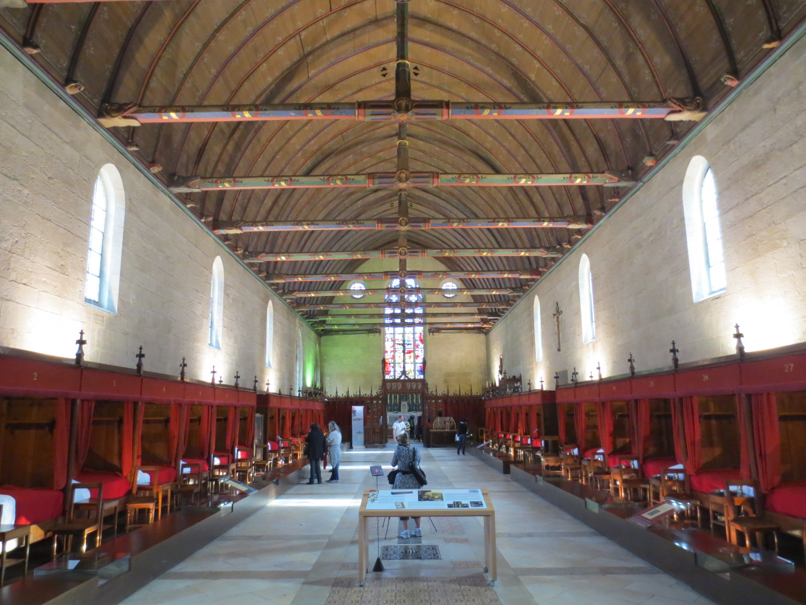 Grande salle des pôvres de l'Hôtel-Dieu de Beaune